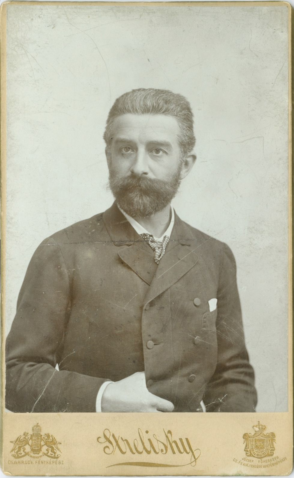 Arany László (1844–1898) költő, népmesegyűjtő